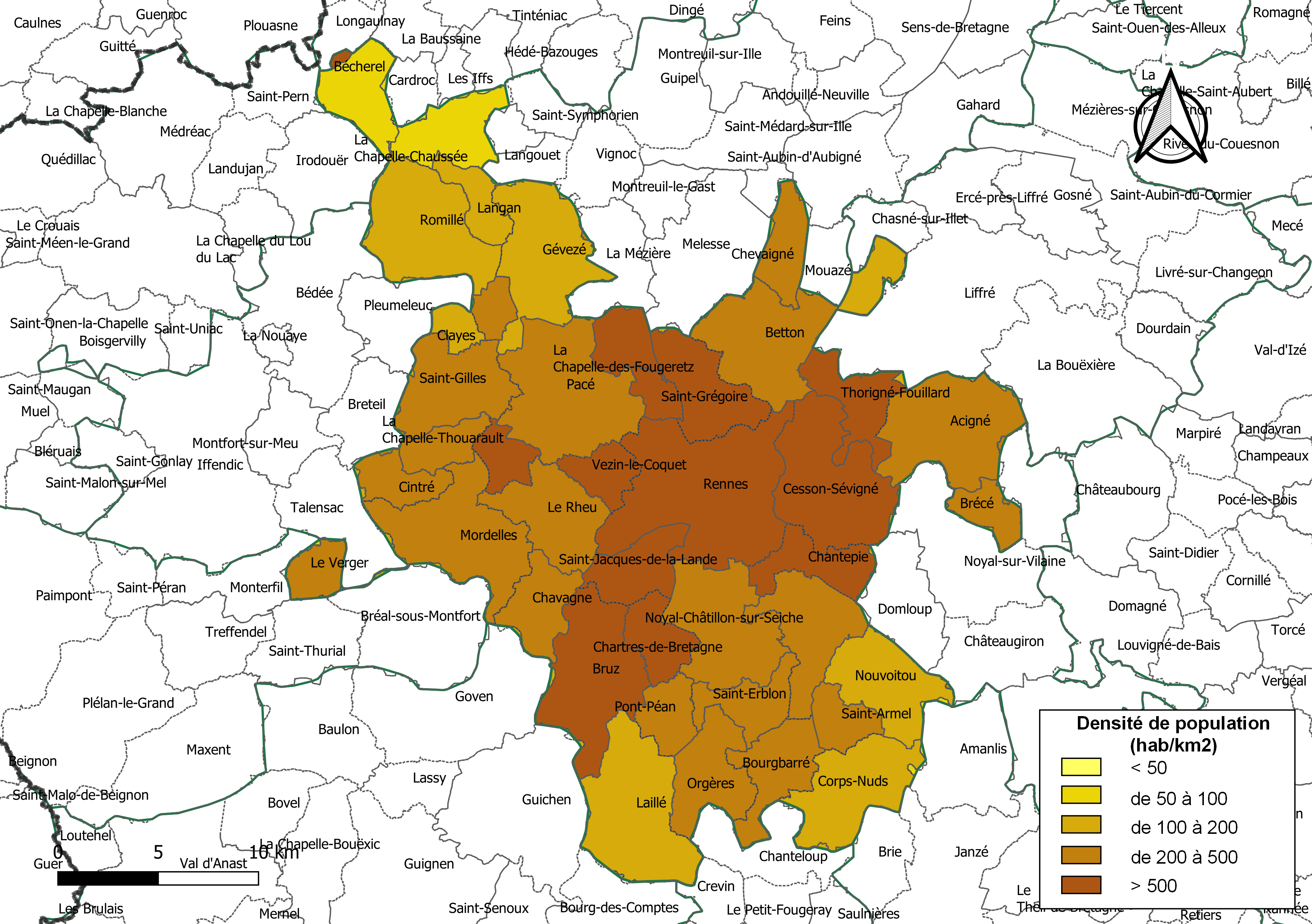 Carte des densités de population (millésimée 2016) des communes de l'intercommunalité Rennes Métropole, département d'Ille-et-Vilaine, France. Composition au 1er janvier 2019.